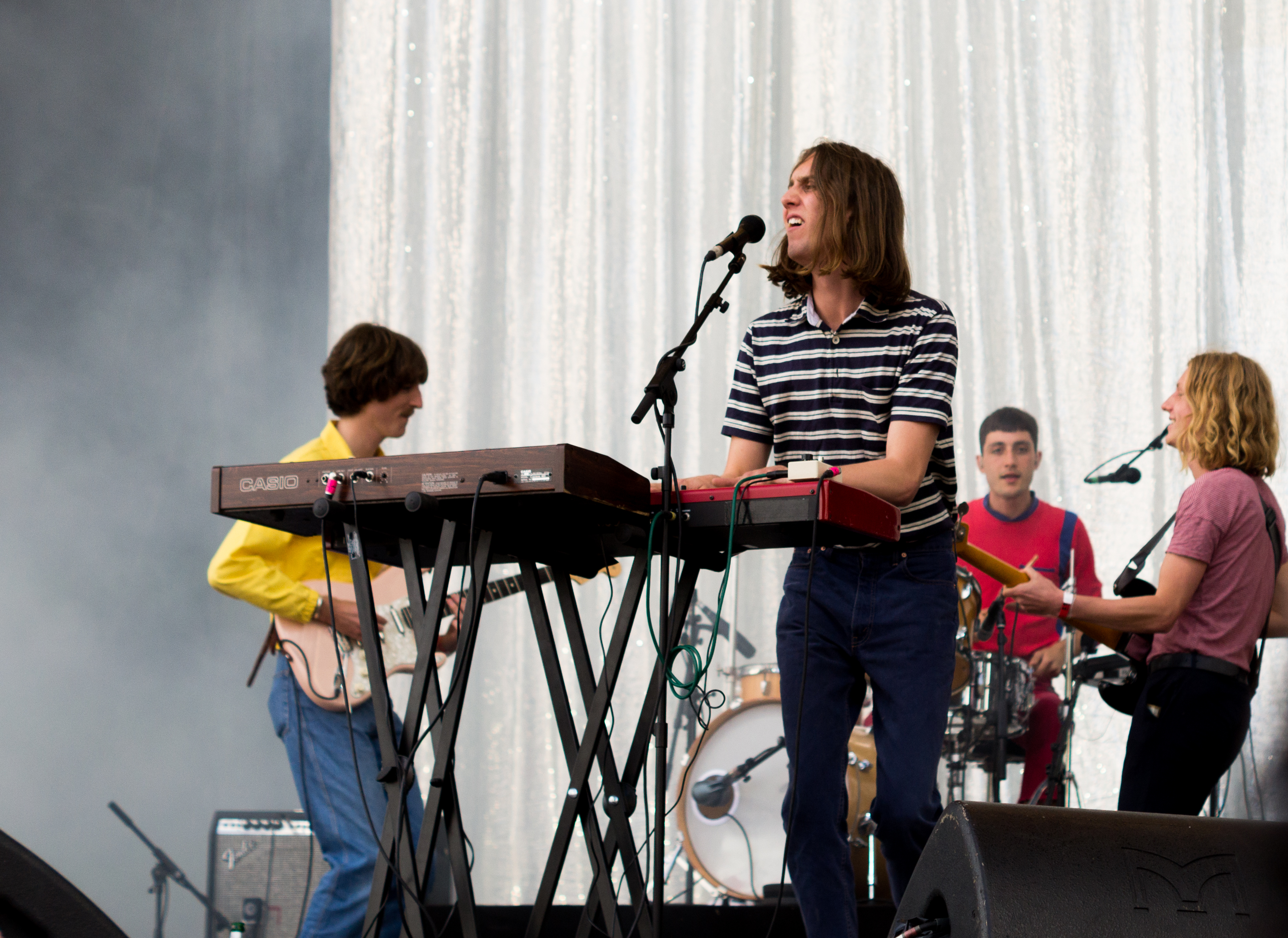 Die Band Parcels auf dem Kosmonaut Festival 2017 in Chemnitz